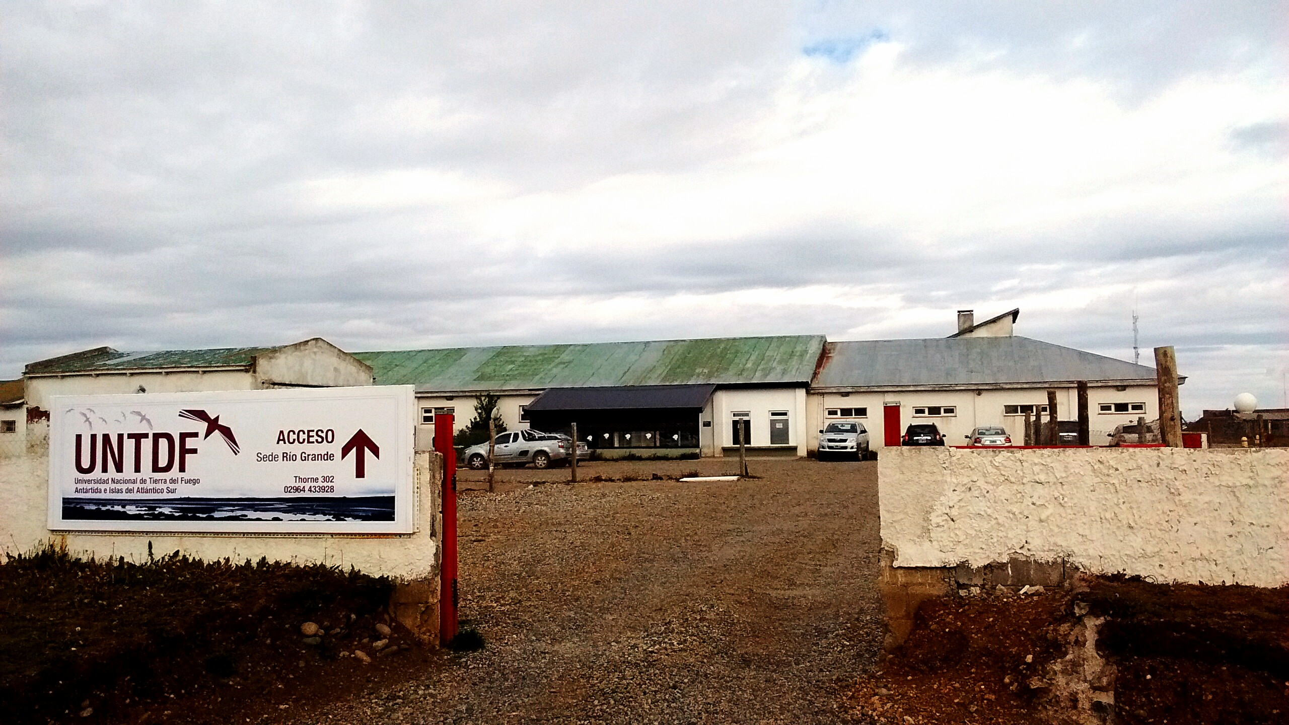 Instalaciones de la UNTF en Río Grande